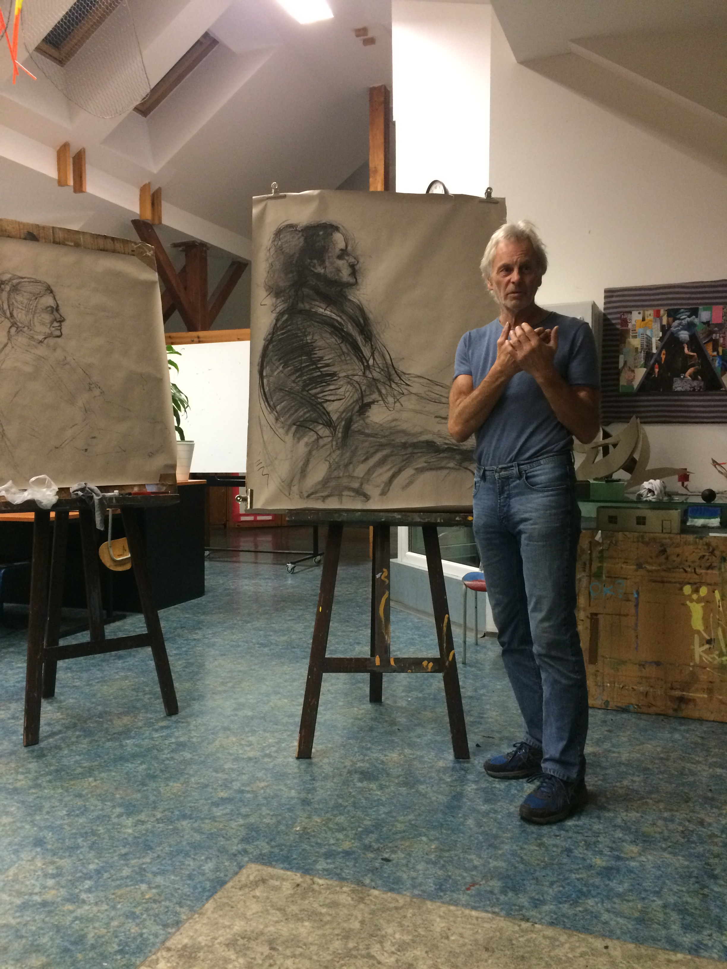 Jiří Janda, lekce malby v Avvy atelieru